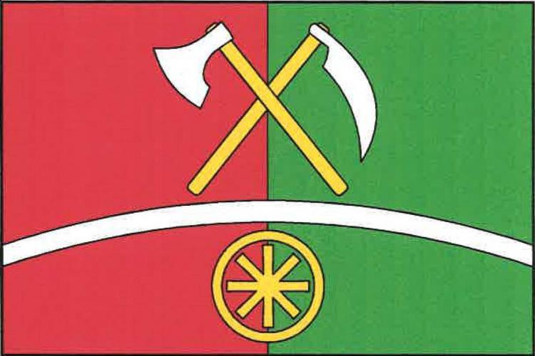 Vlajka, Čečelovice, okres Strakonice